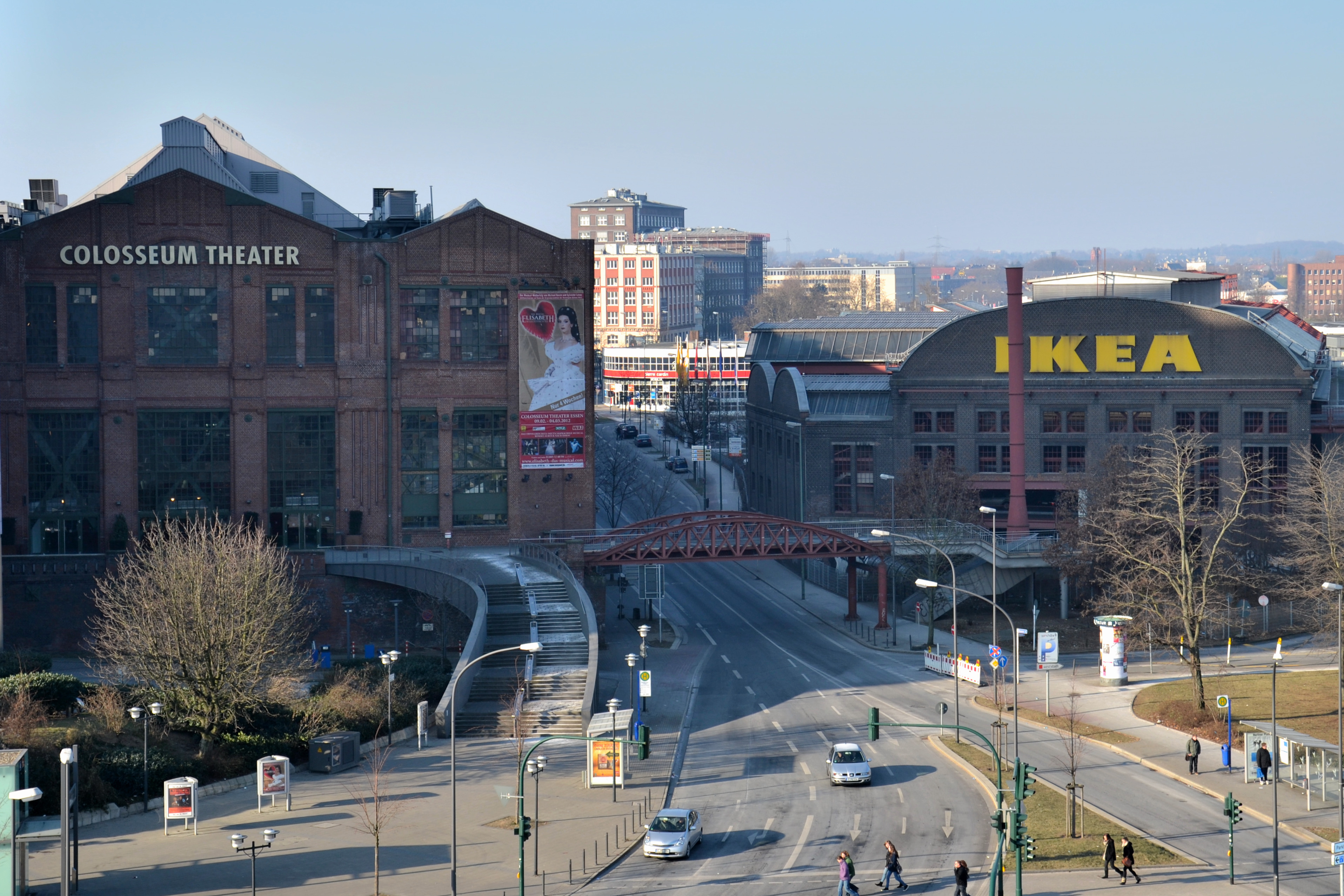 Ehem. Eingang zur Kruppstadt Essen: links 8. Mechanische Werkstatt (Heute Colosseum Theater), Werksbahnbrücke, Rechts ehem. Press- und Hammerwerk Ost